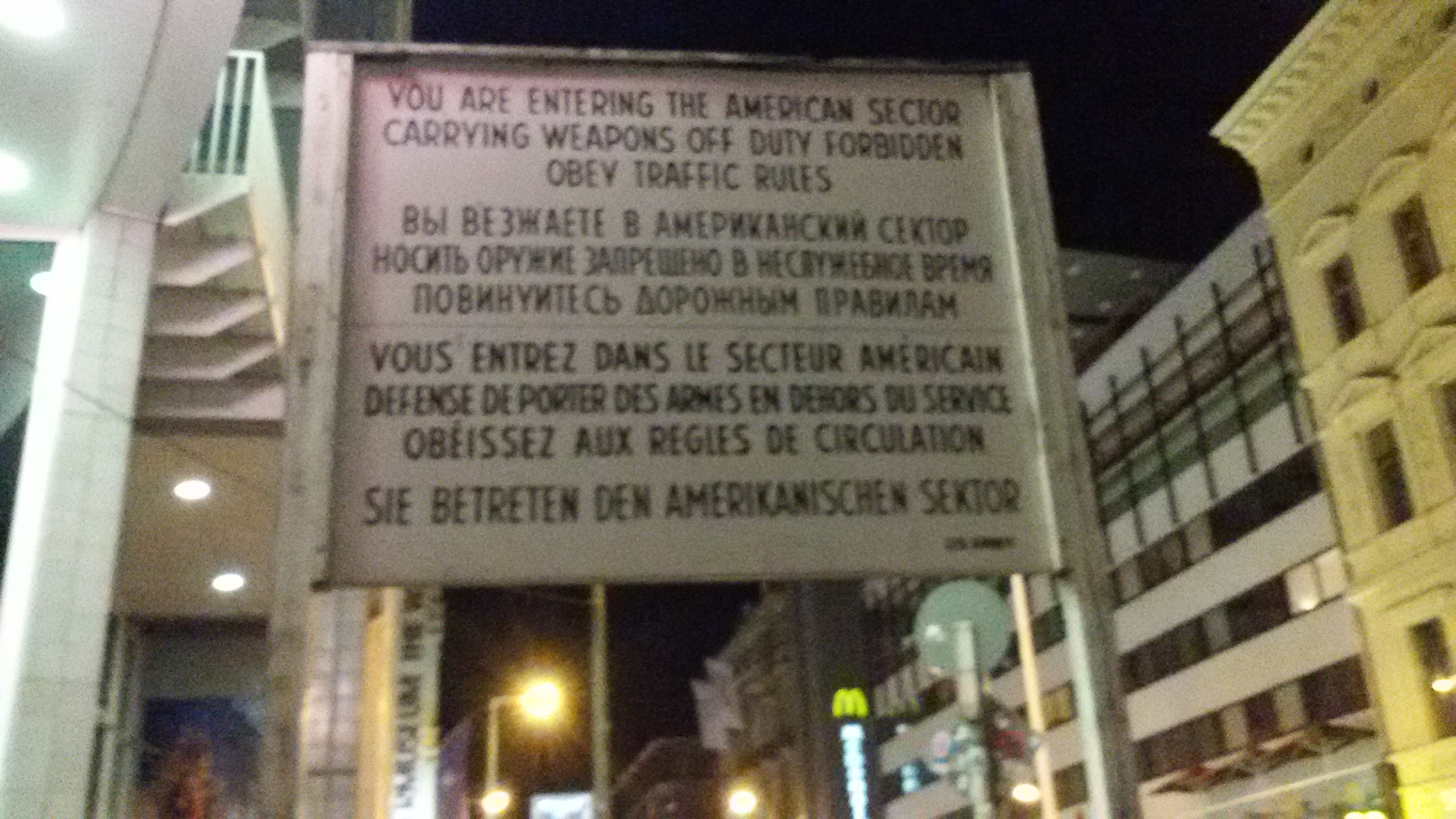 ചെക്പോയ്ന്റ് ചാർളി സോവിയറ്റ് ഭാഗത്തു നിന്ന്